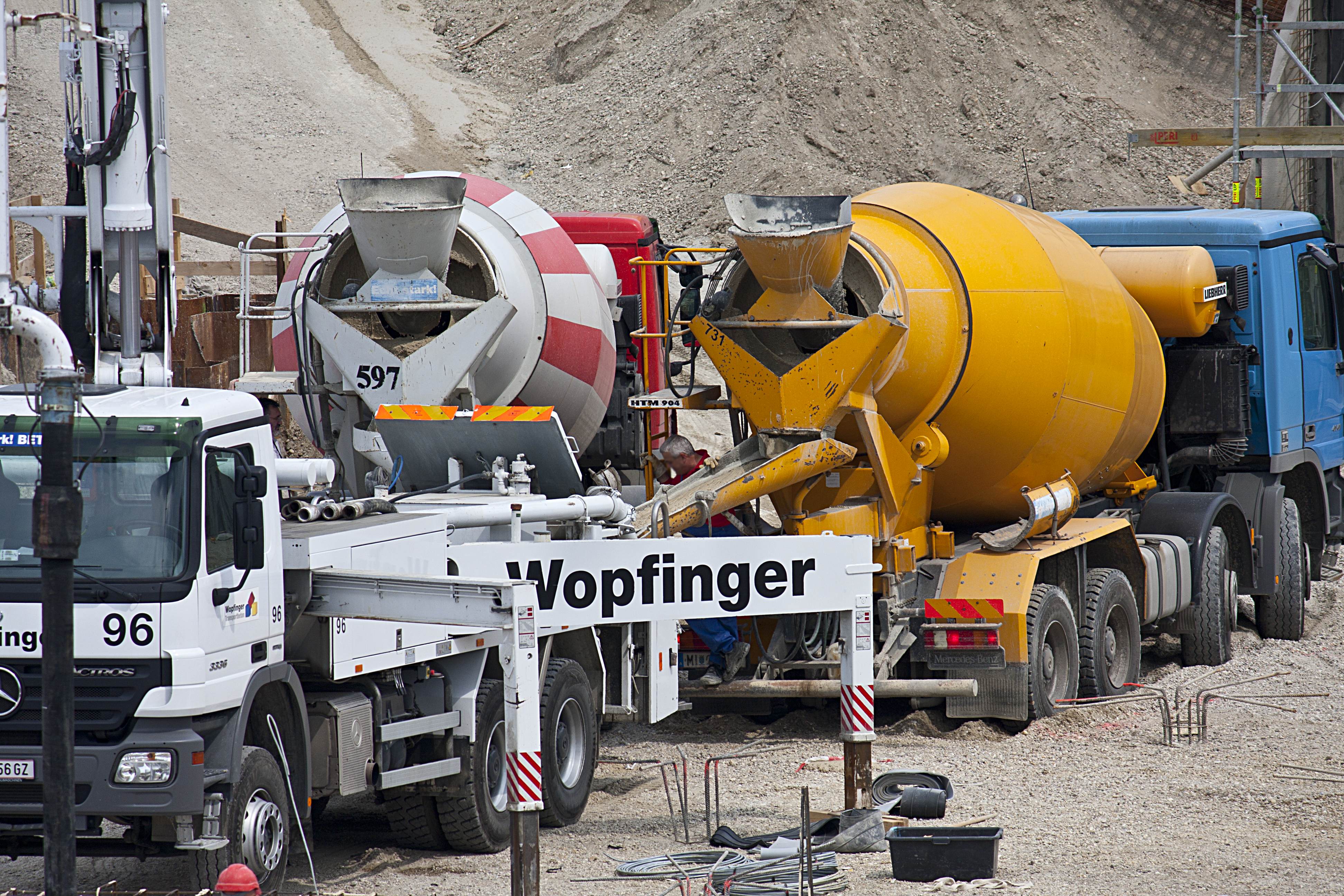 Betonmischer auf einer Baustelle in Österreich.